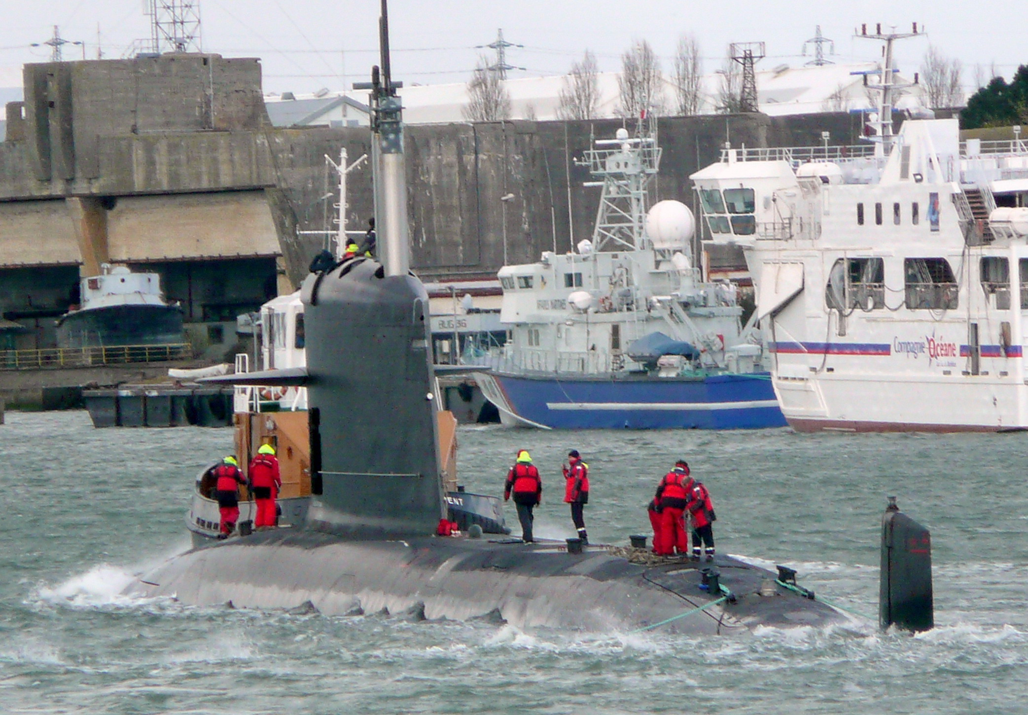 Submarine classe Scorpene durant ses essais à Lorient